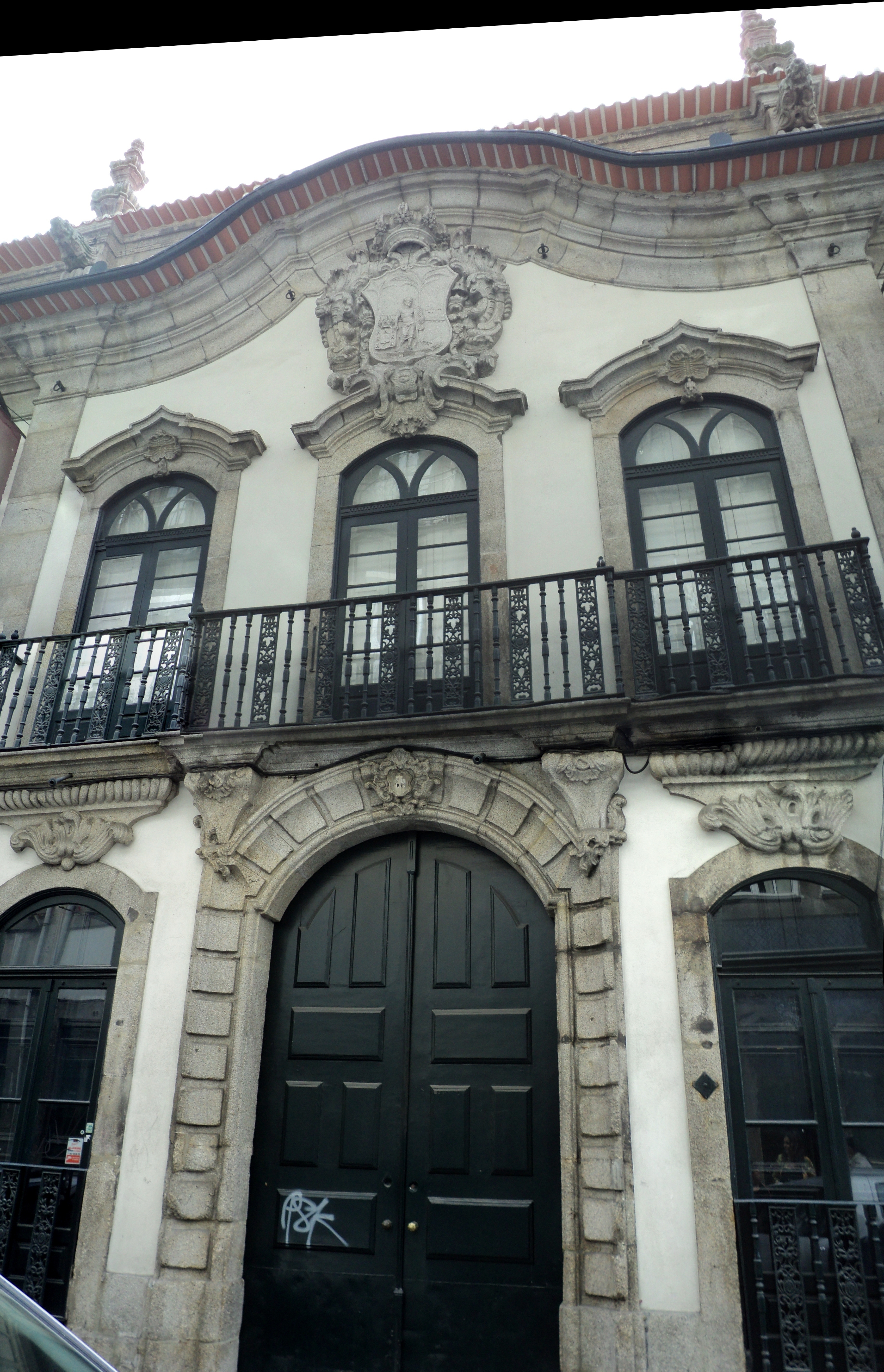 Palacete de Belomonte / Palácio de Belomonte / Casa dos Pacheco Pereira. Em Portugal, Porto, Porto, São Nicolau. This file was uploaded for Wiki Loves Monuments in Portugal with the unique identifier 97005495.